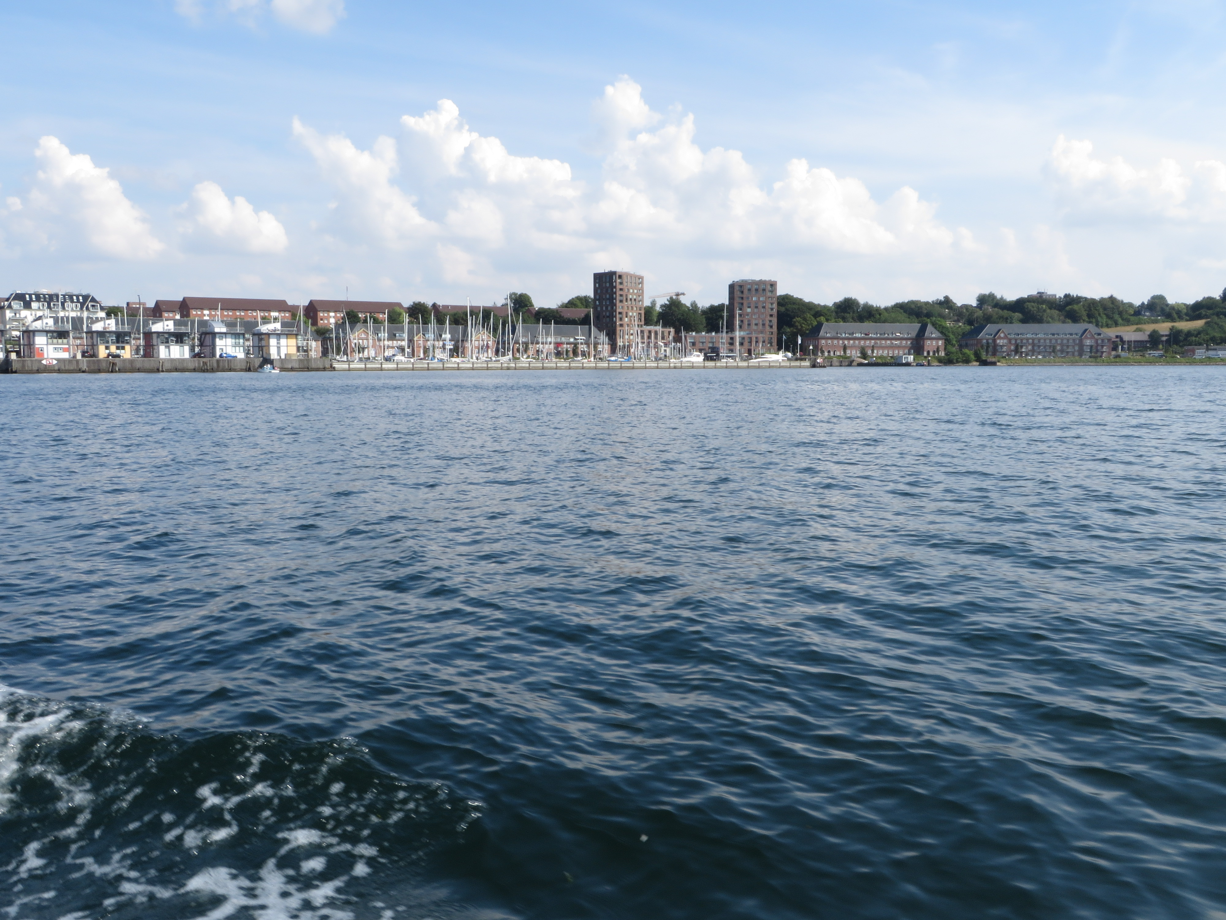 Marina Sonwik mit der Wasserseite (Flensburg-Mürwik, 29 Juli 2014), Bild 02